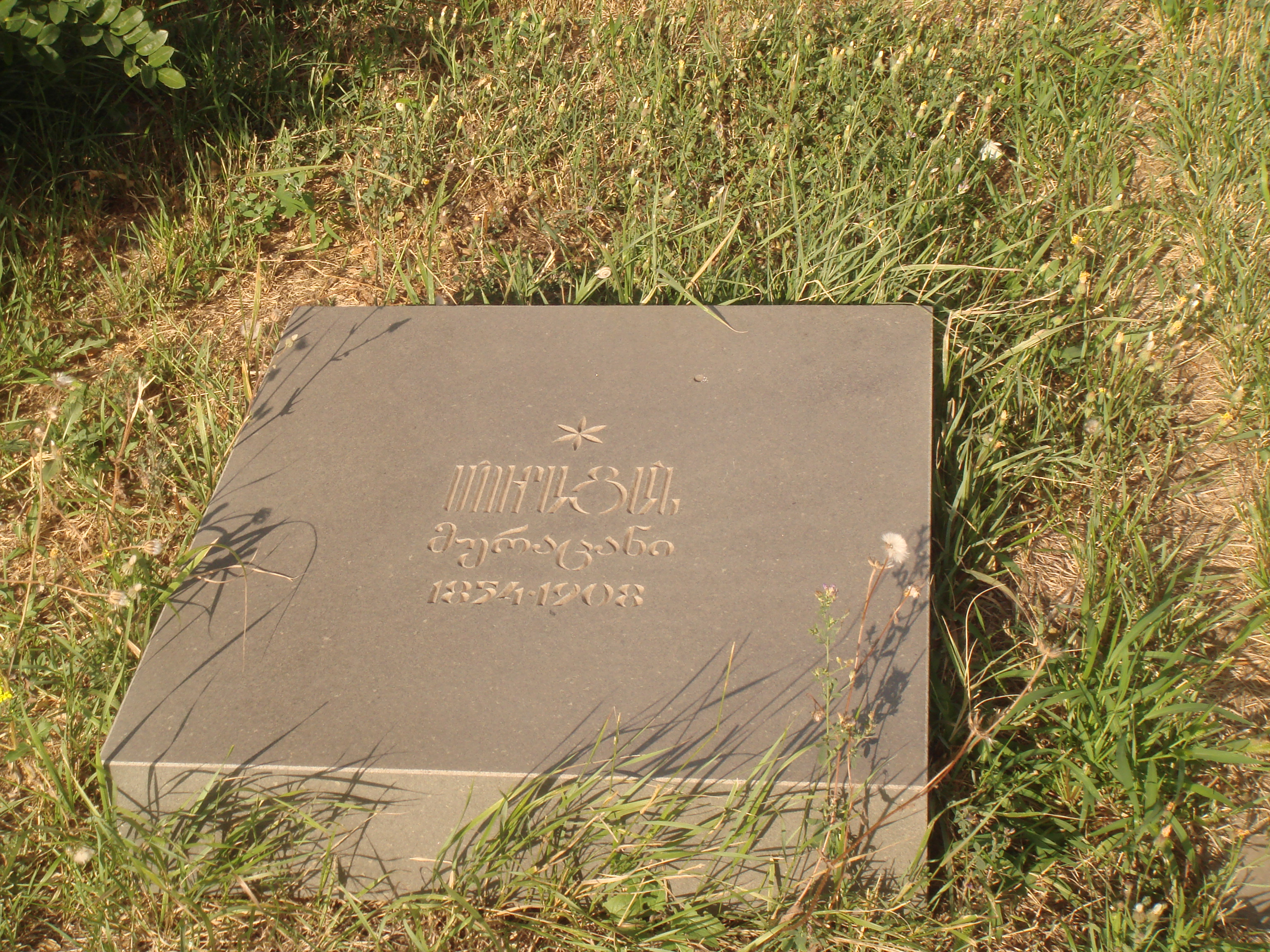 Խոջիվանքի պանթեոն